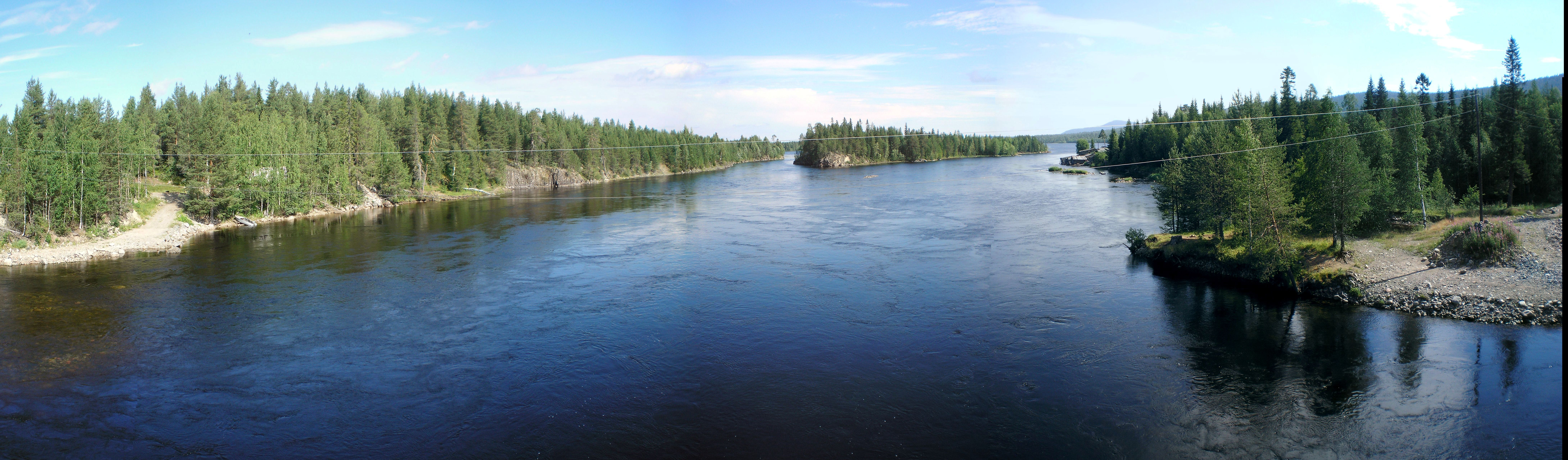 Иова с моста на восток